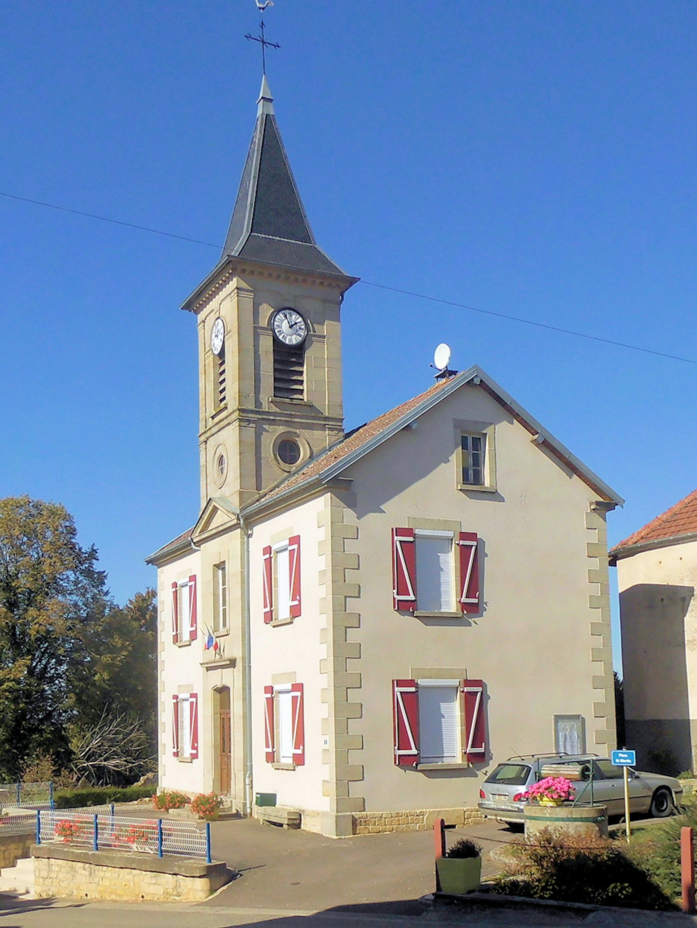 La mairie avec clocher de Plainemont